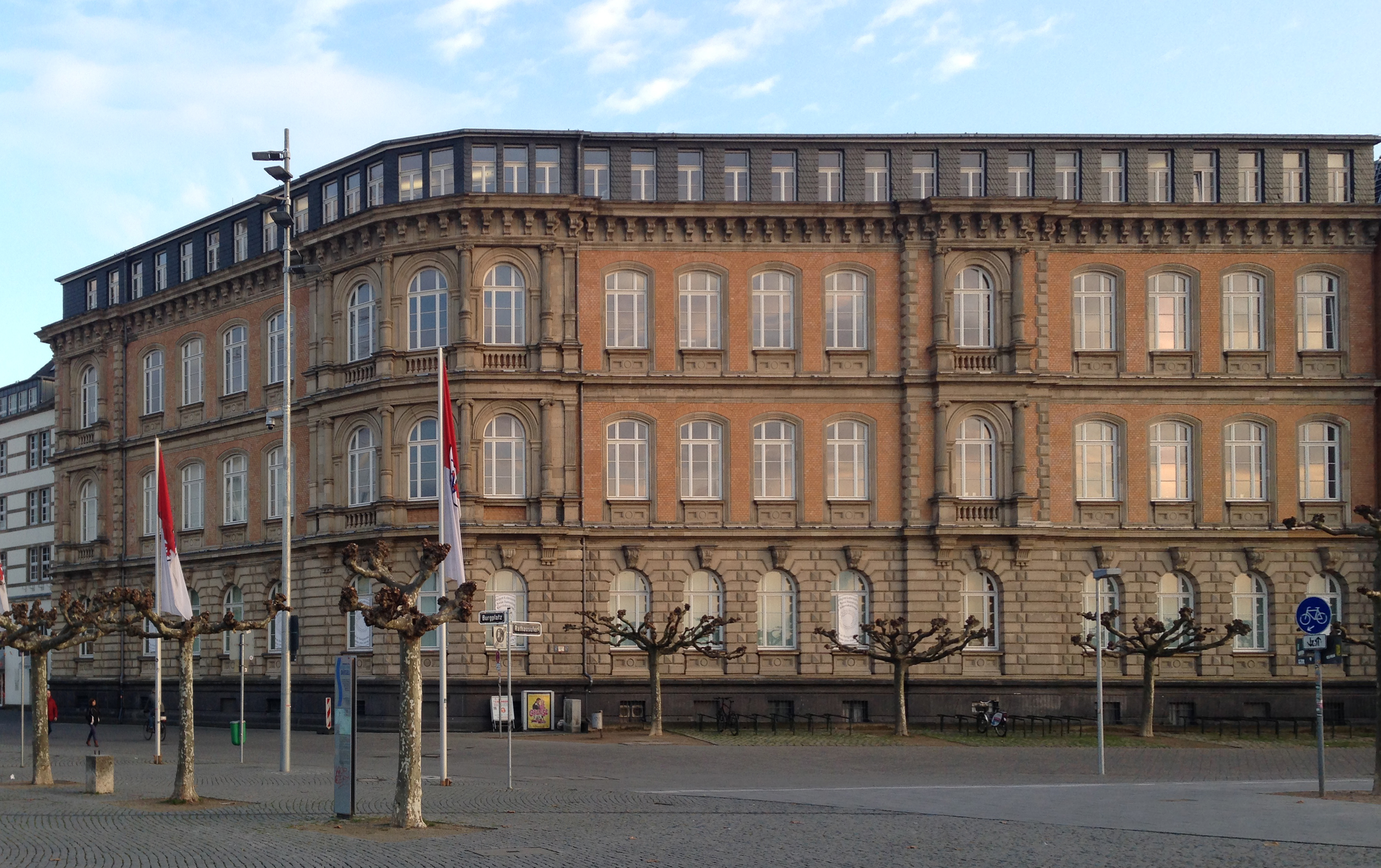 Burgplatz 1, Fassade am Burgplatz und Rathausufer, Düsseldorf-Altstadt